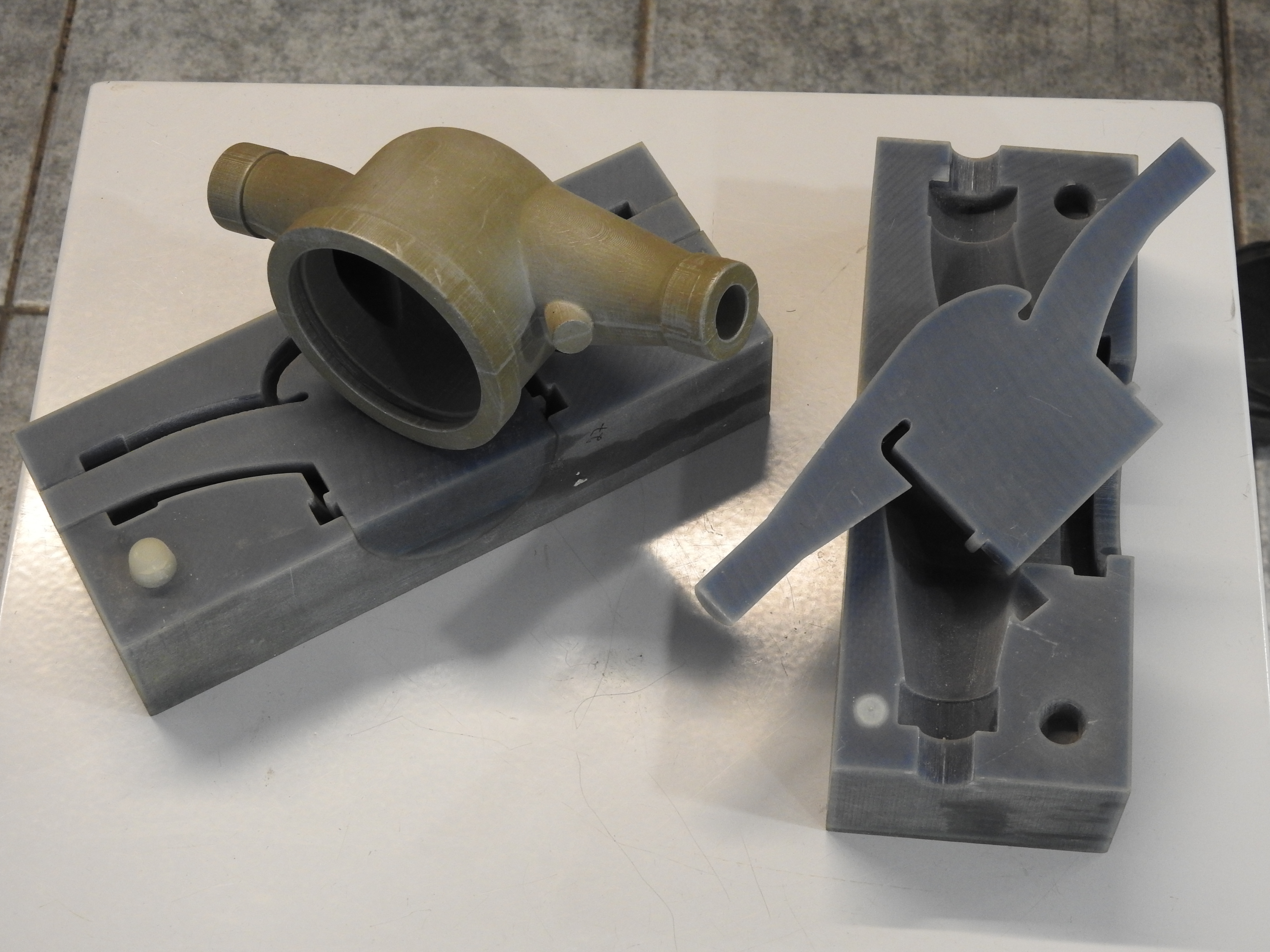 מערכת תבניות פנימית וחיצונית ליציקת שעווה נעלמת של שעון מים הפולימר בנוי כקליפה דקה הכולאת שעווה